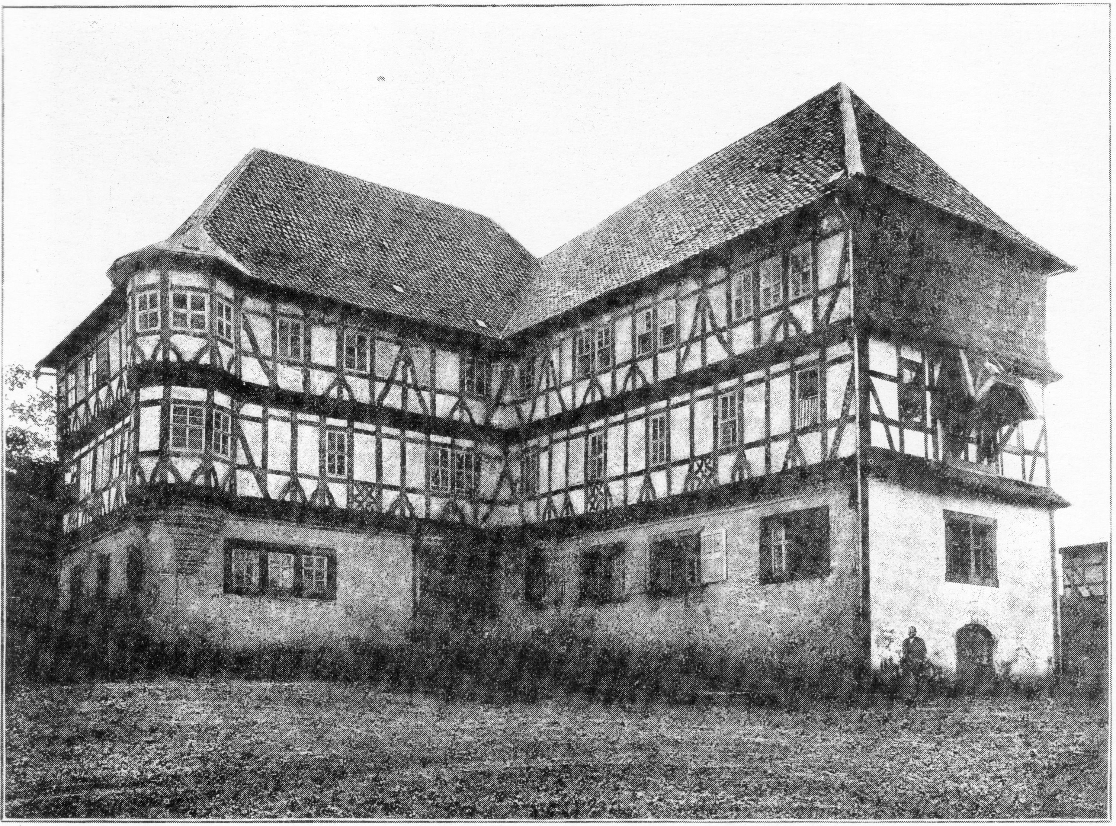 Abb. 228. Schloß Keudelstein